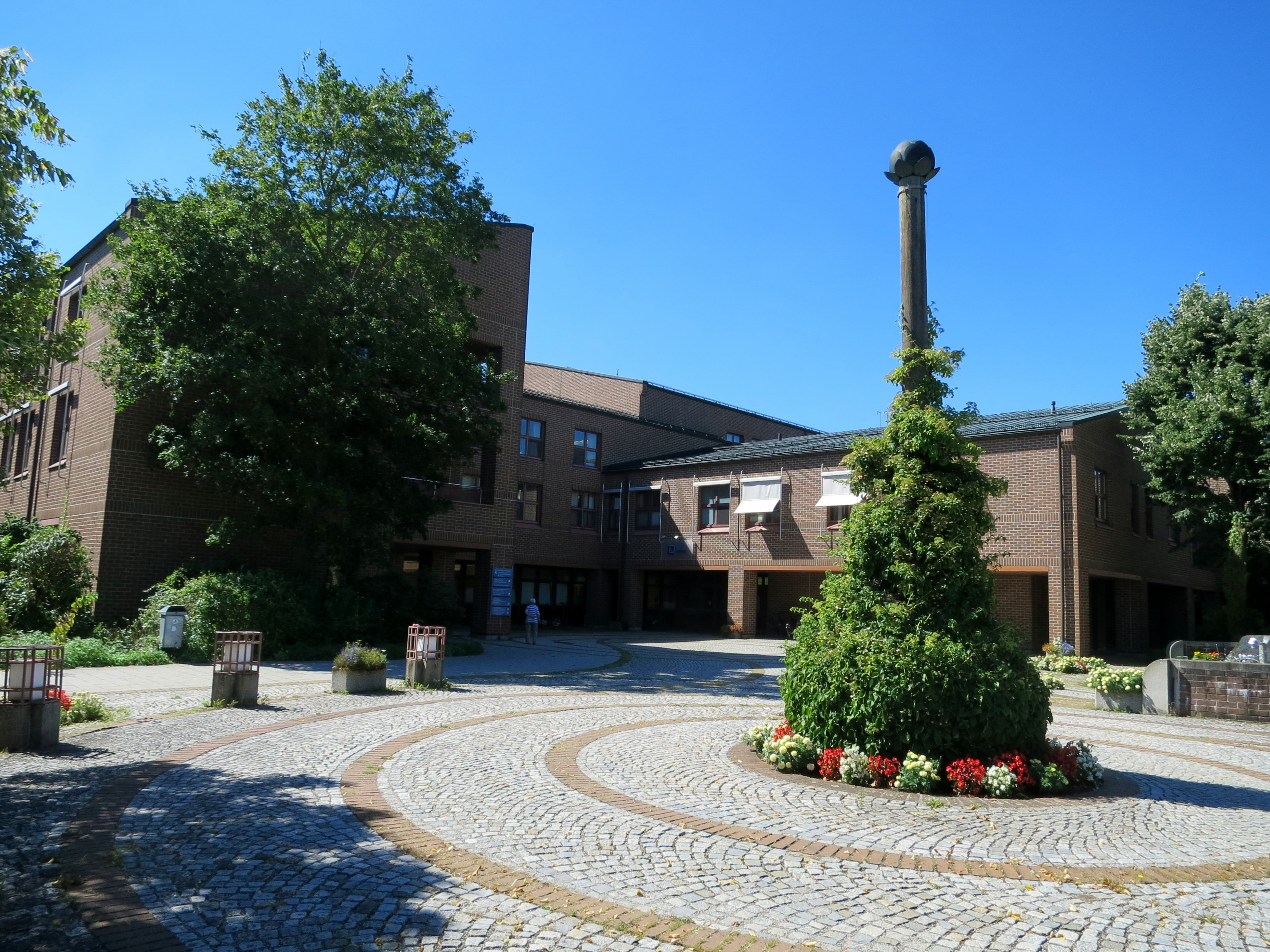 Haupteingangsbereich der Klinik